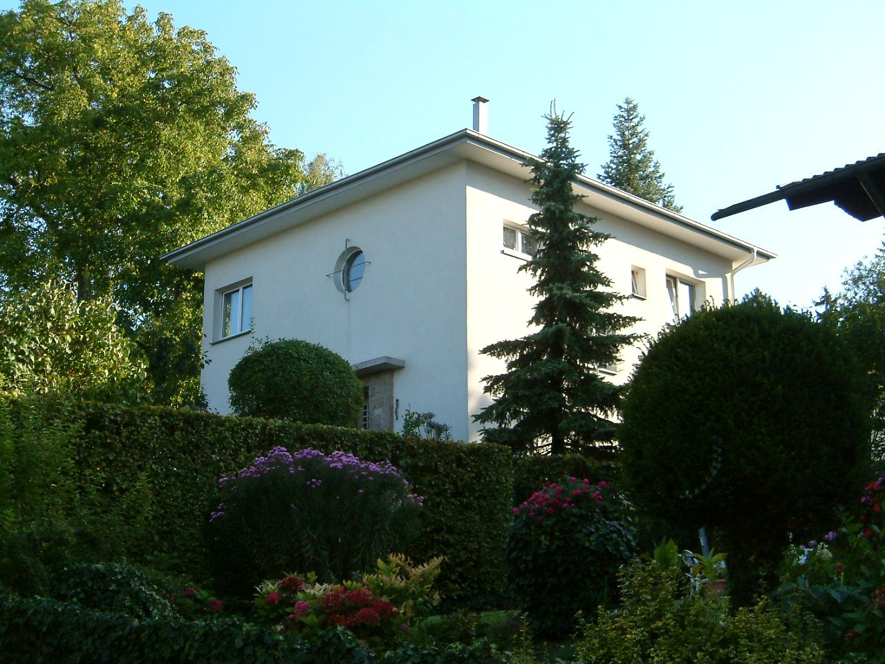 Arch. Franz Kleinsteuber, Würzburg, Christoph-Mayer-Weg 2, Sommerhaus für Prof. Fritz Knapp